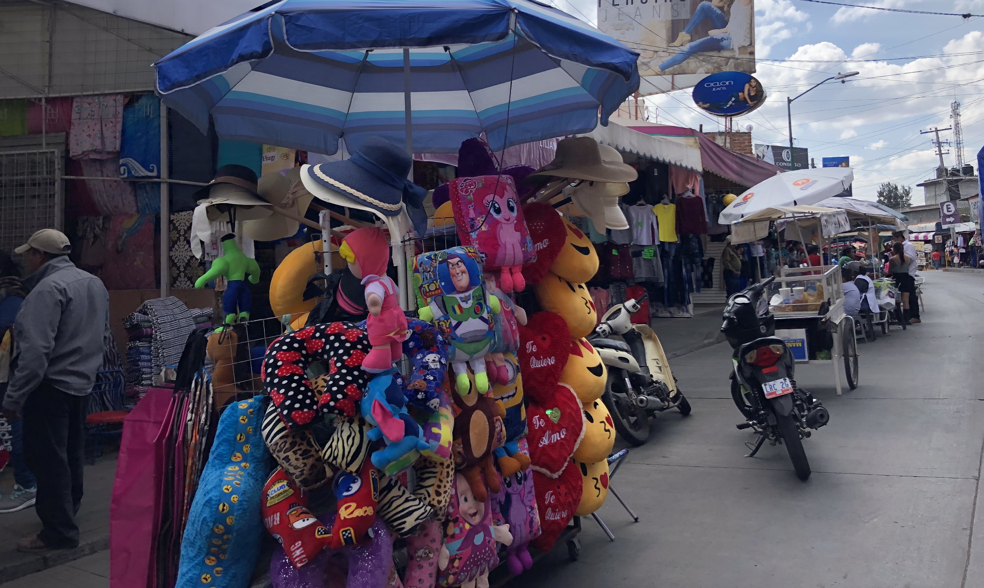 Zona Comercial Textil Uriangato en la Av. Álvaro Obregón, imagen que muestra los puestos de ropa de Uriangato.